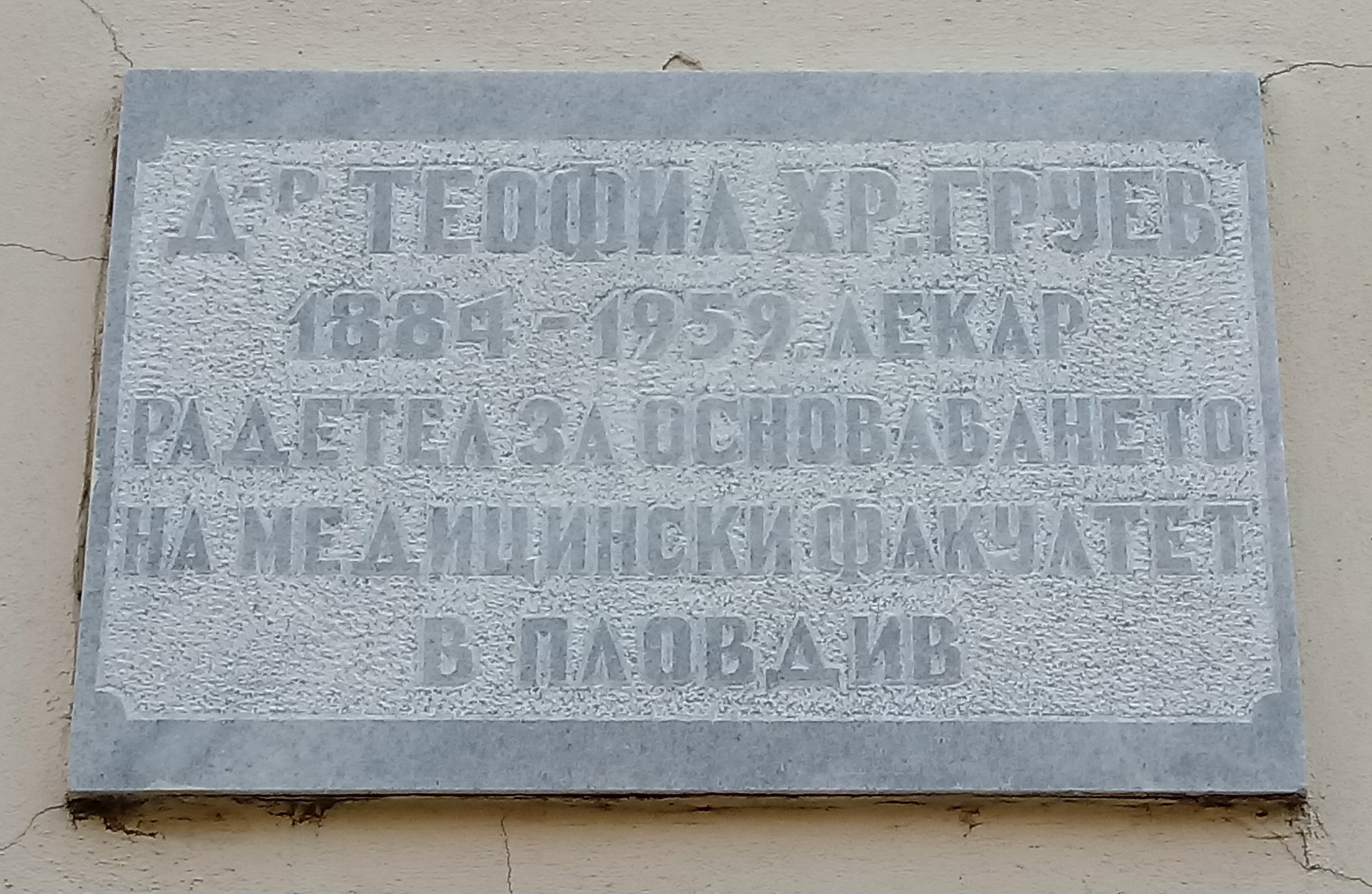 Teofil Gruev memorial plaque, 5 Dondukov Str., Plovdiv